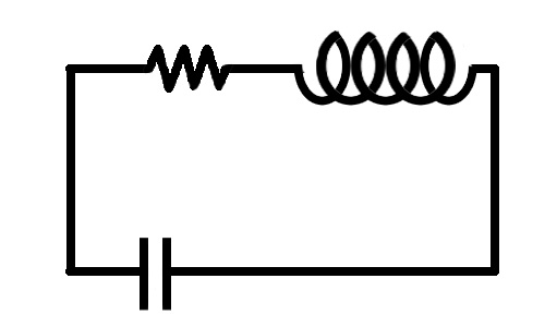 교류회로도